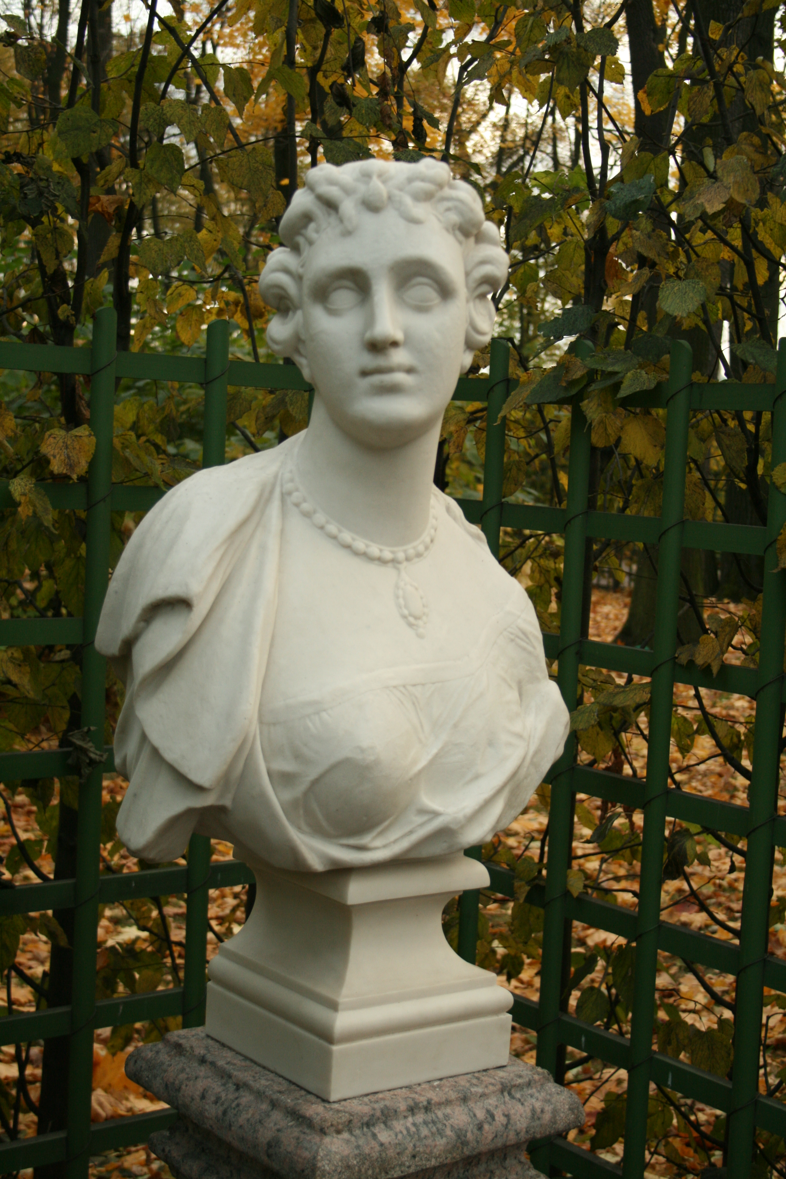 Бюст Скрибонии (Санкт-Петербург, аллея Росси)